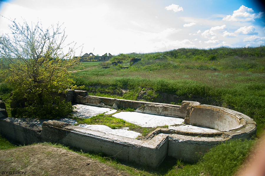 Каменская Сечь